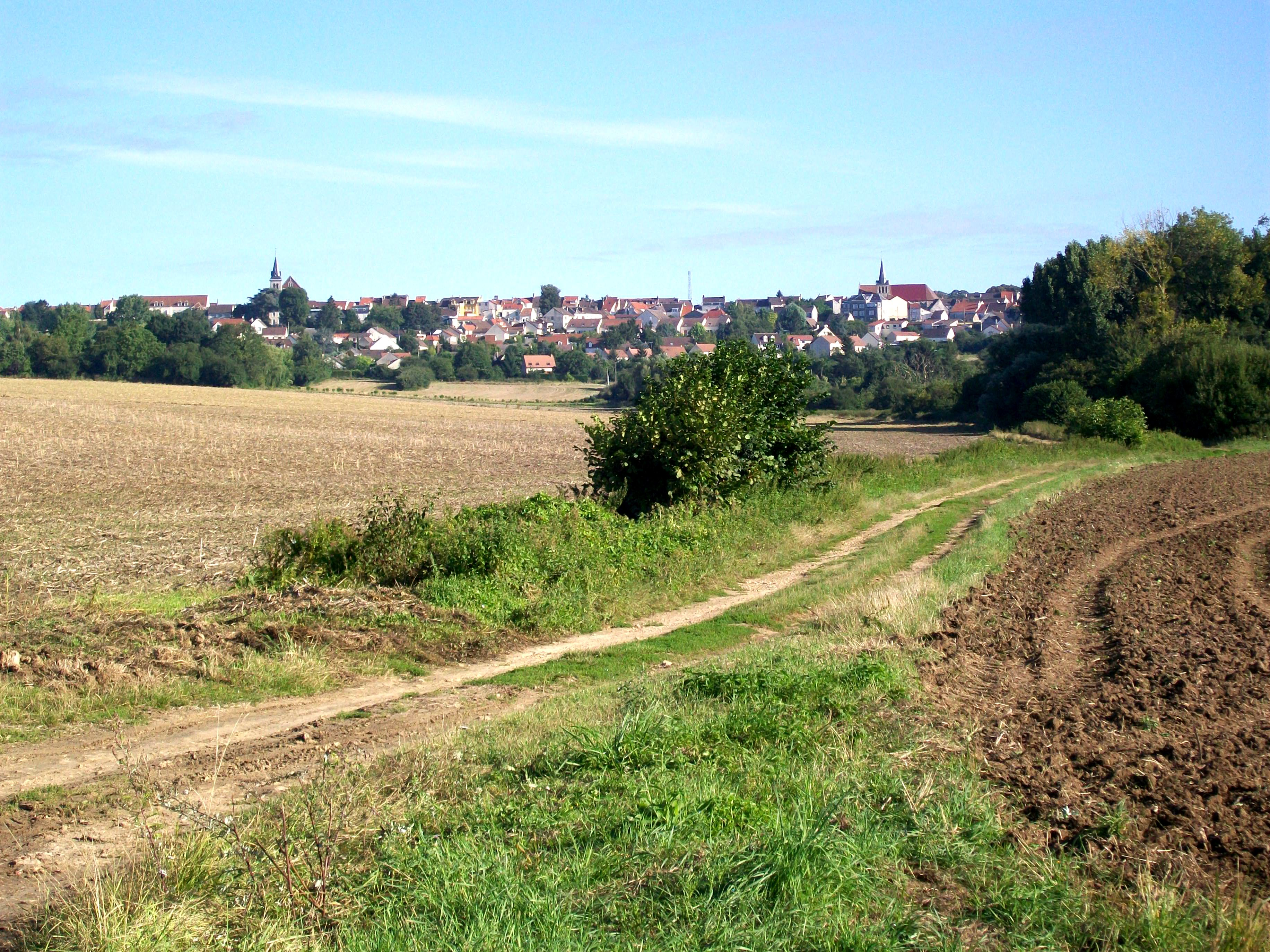 Panorama de Dammartin depuis le GR 1, en venant de Saint-Mard.